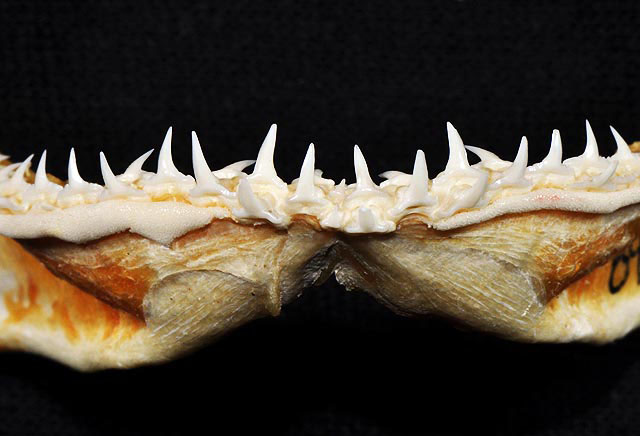 Sphyrna tudes